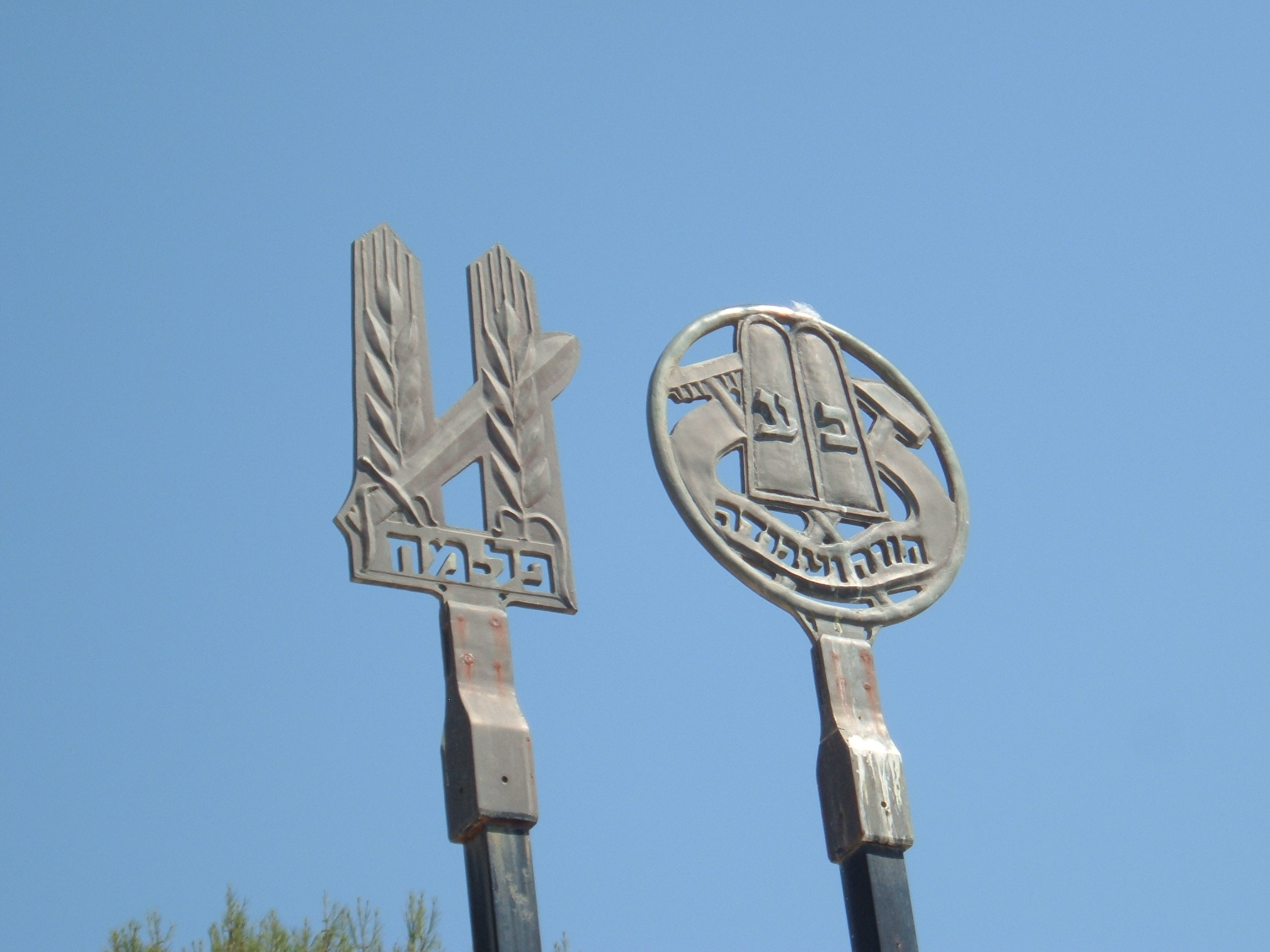 Palmach and Bney Akiva insignia displayed in Birya fortress.סמלי הפלמ"ח ובני עקיבא המוצגים במצודת ביריה